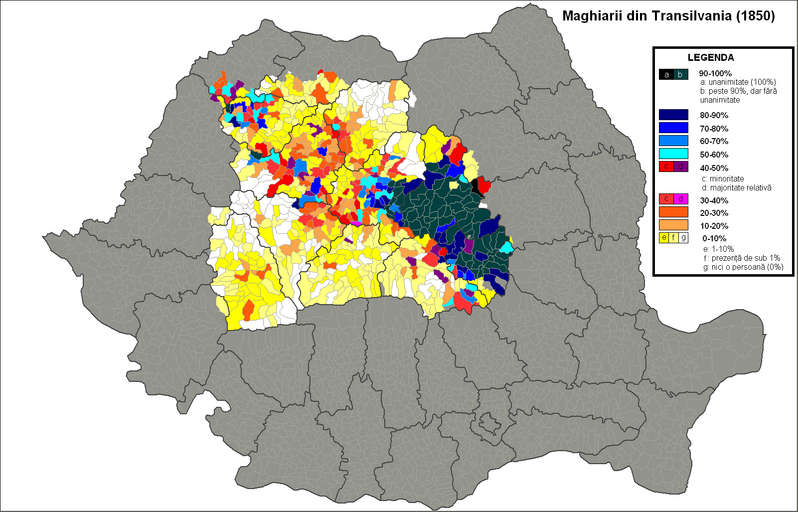 Totalul persoanelor declarate fie drept "secui", fie drept "maghiari" la recensământul organizat de autorităţile habsburgice în Transilvania în anul 1850. Harta reprezintă limitele administrative actuale: judeţe, comune, oraşe.